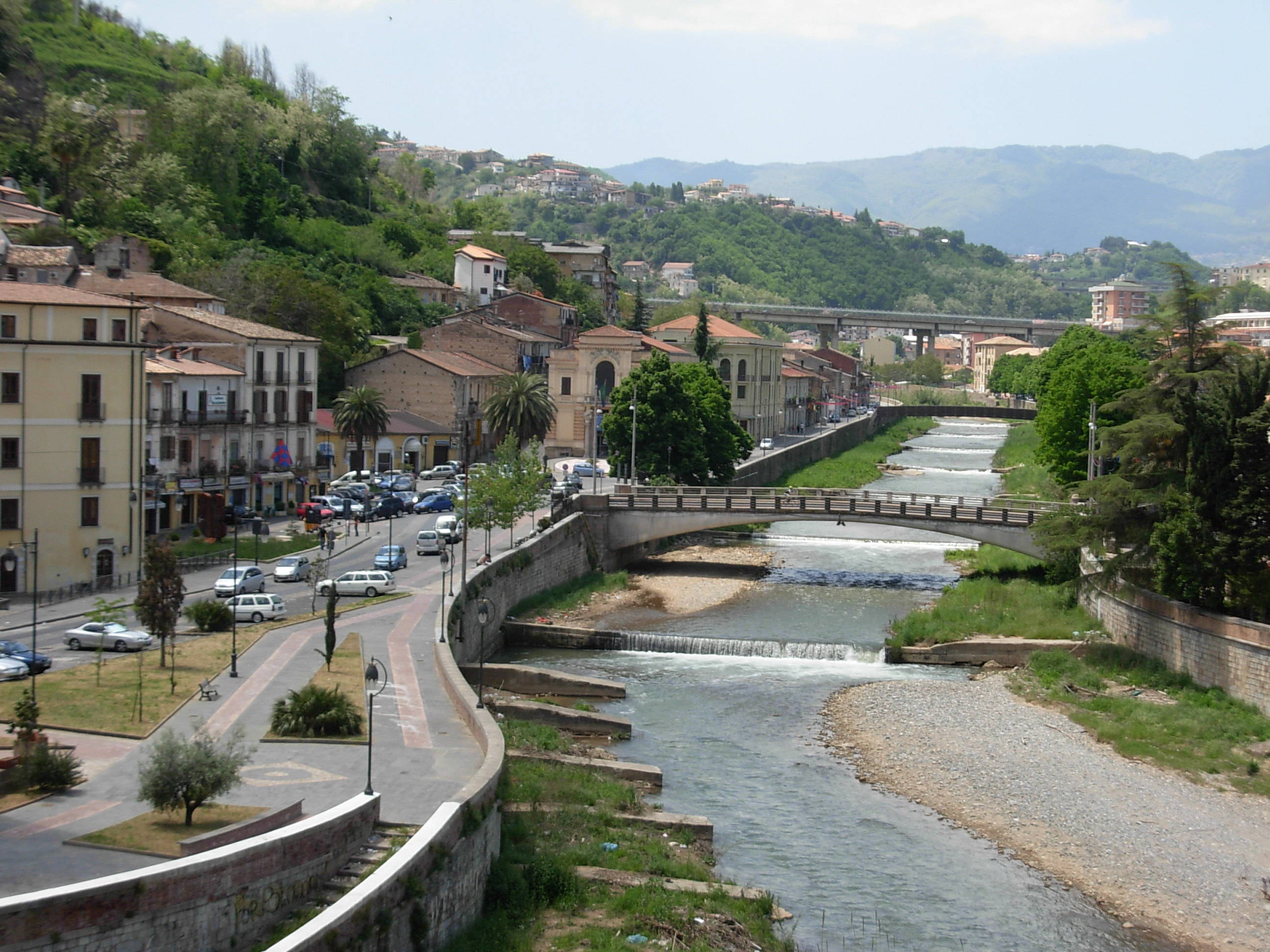 Fiume Busento